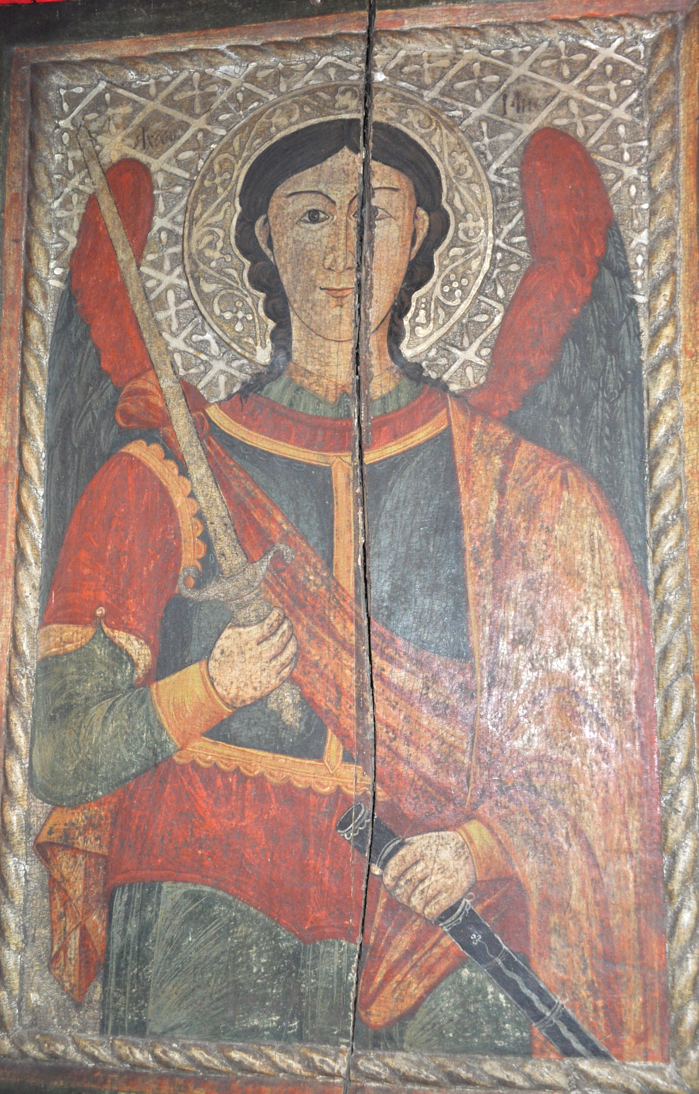 Biserica de lemn din Dâncu, județul Cluj